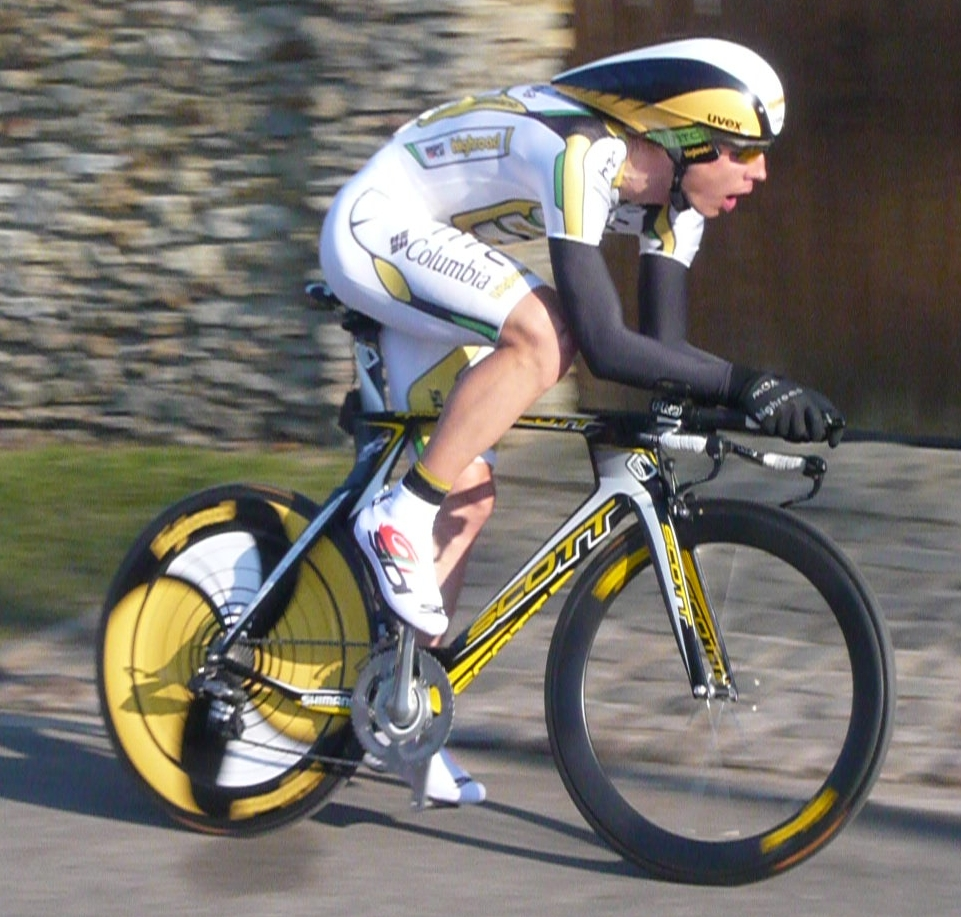 Tony martin paris nice 2010